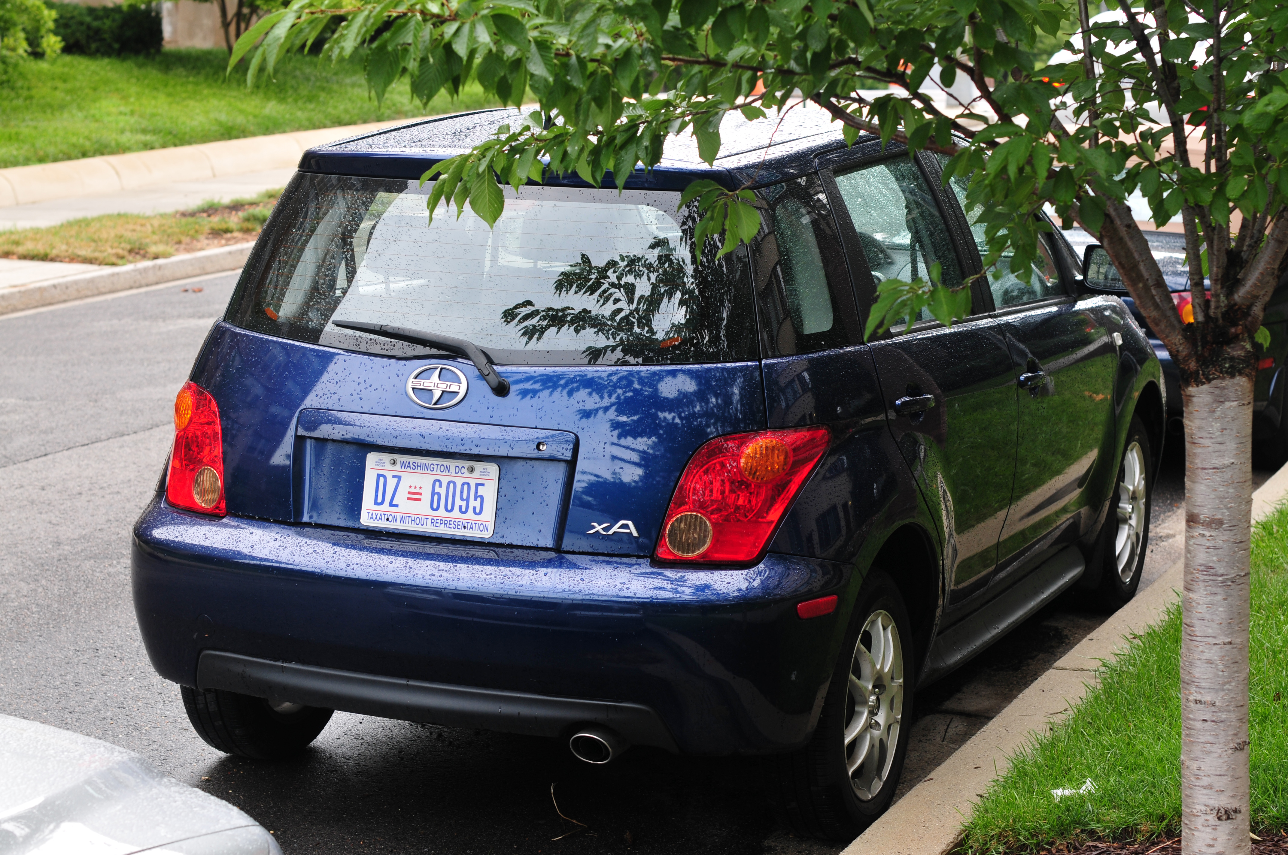 Impressionen Wikimania Washington D.C. 2012 The making of this work was supported by Wikimedia Austria. For other files made with the support of Wikimedia Austria, please see the category Supported by Wikimedia Österreich.